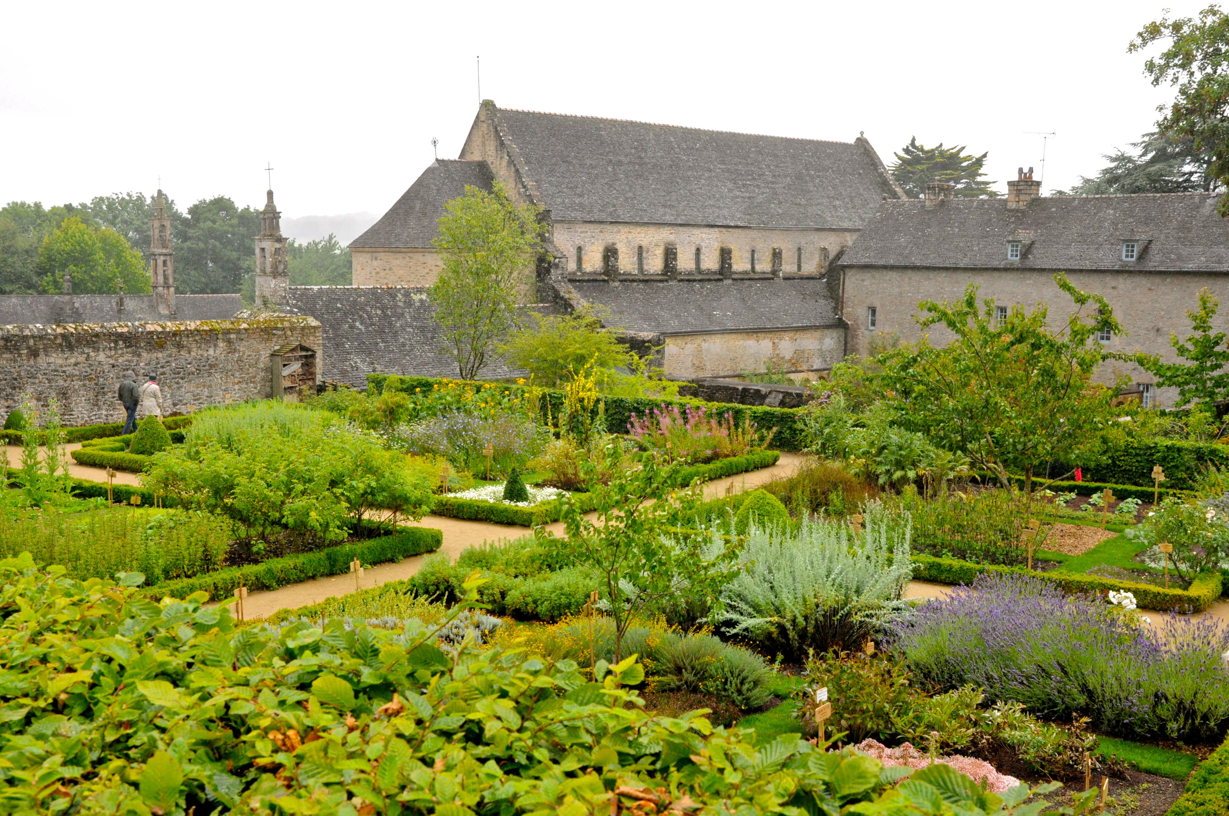 Le jardin des plantes médicinales dans le parc de l'Abbaye de DAOULAS.